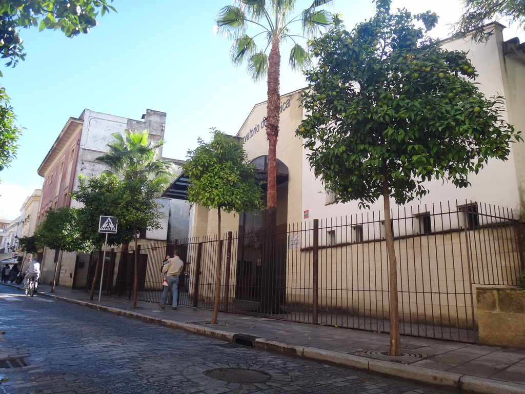 Nuevo conservatorio "Joaquín Villatoro" de Jerez de la Frontera (Andalucía, España) C/ Rosario, 14